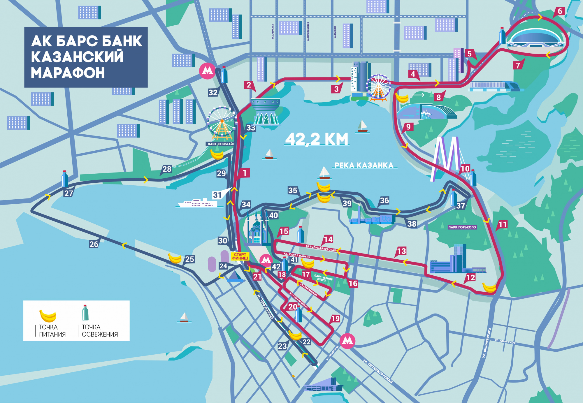 трасса Казанского марафона 2018